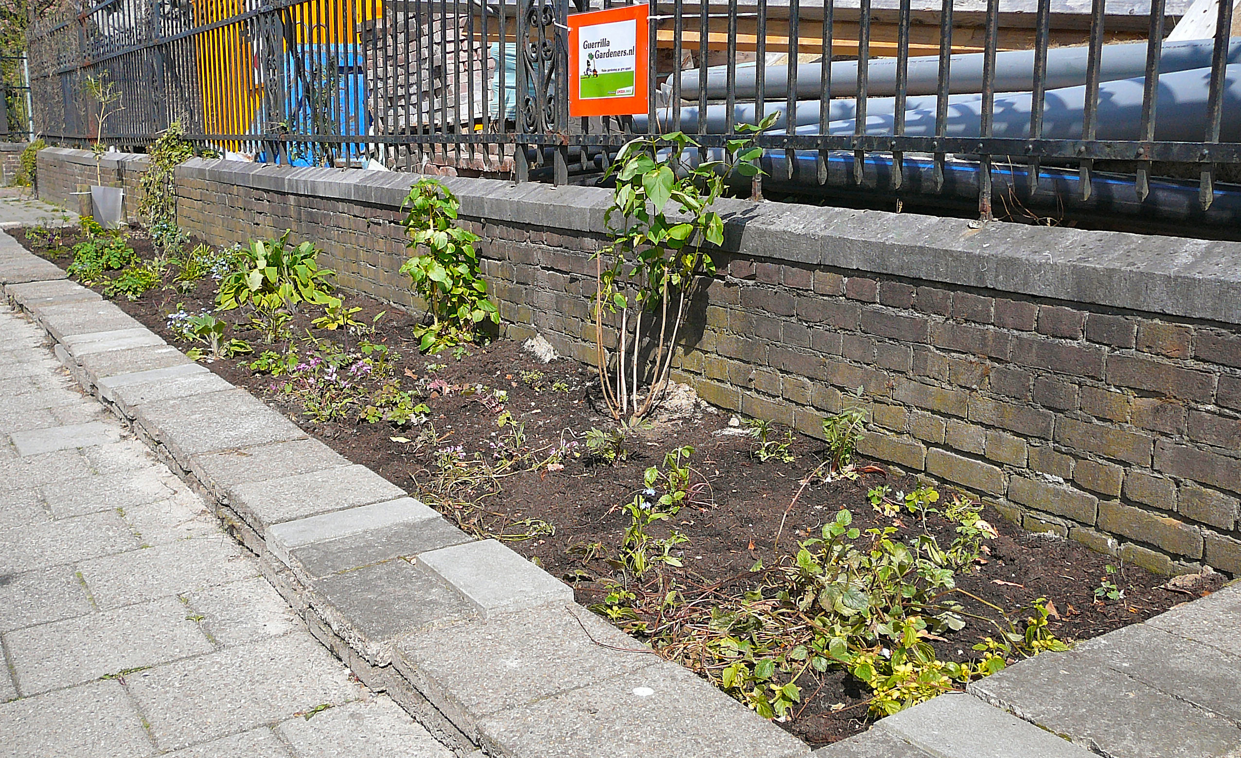 Een tuintje van de Guerilla gardeners.